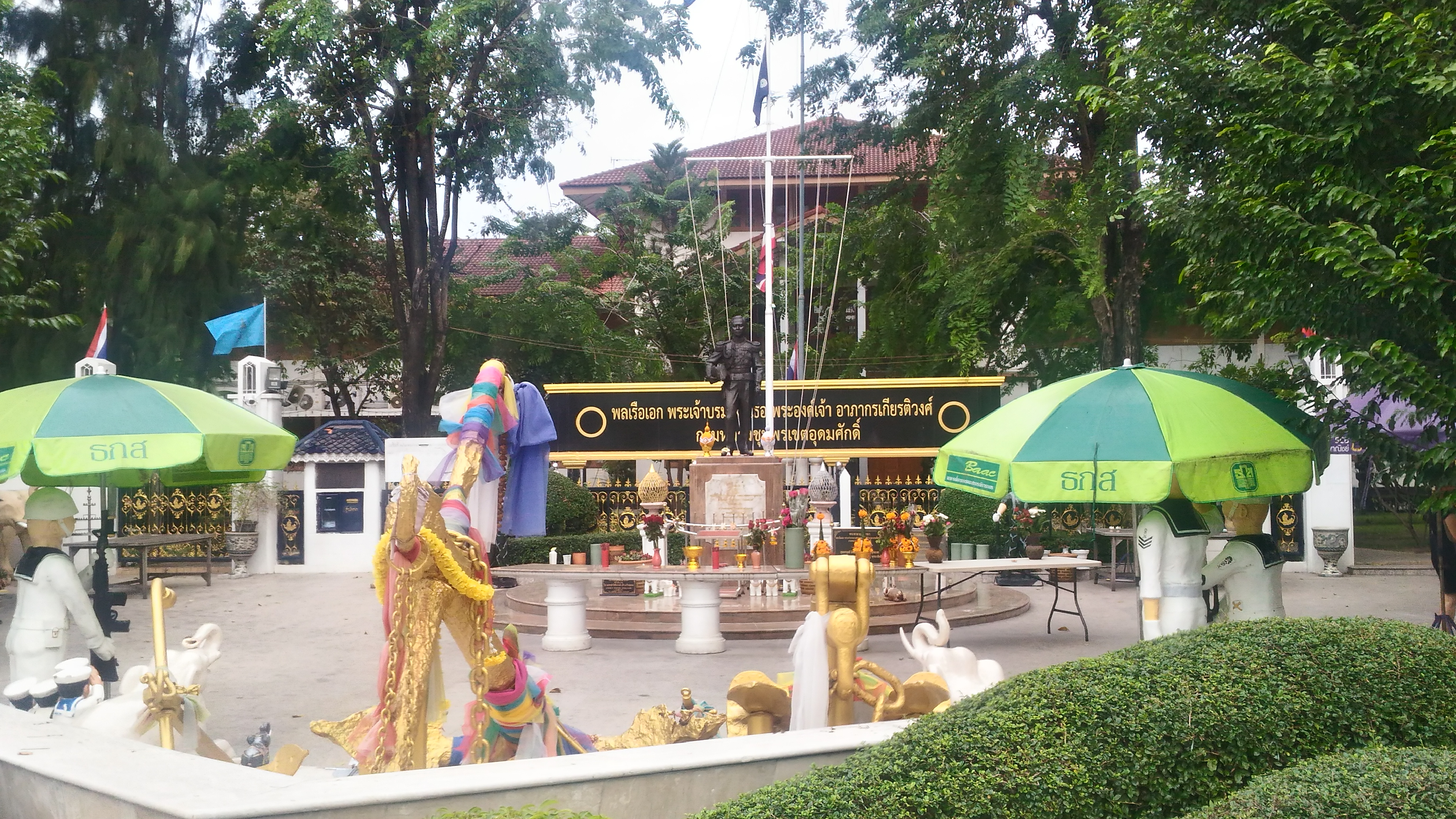 พระอนุสาวรีย์นายพลเรือเอก พระเจ้าบรมวงศ์เธอ พระองค์เจ้าอาภากรเกียรติวงศ์ กรมหลวงชุมพรเขตอุดมศักดิ์ ณ มหาวิทยาลัยเทคโนโลยีราชมงคลพระนคร ศูนย์พณิชยการพระนคร (วังนางเลิ้งเดิม) ถนนพิษณุโลก เขตดุสิต กรุงเทพมหานคา